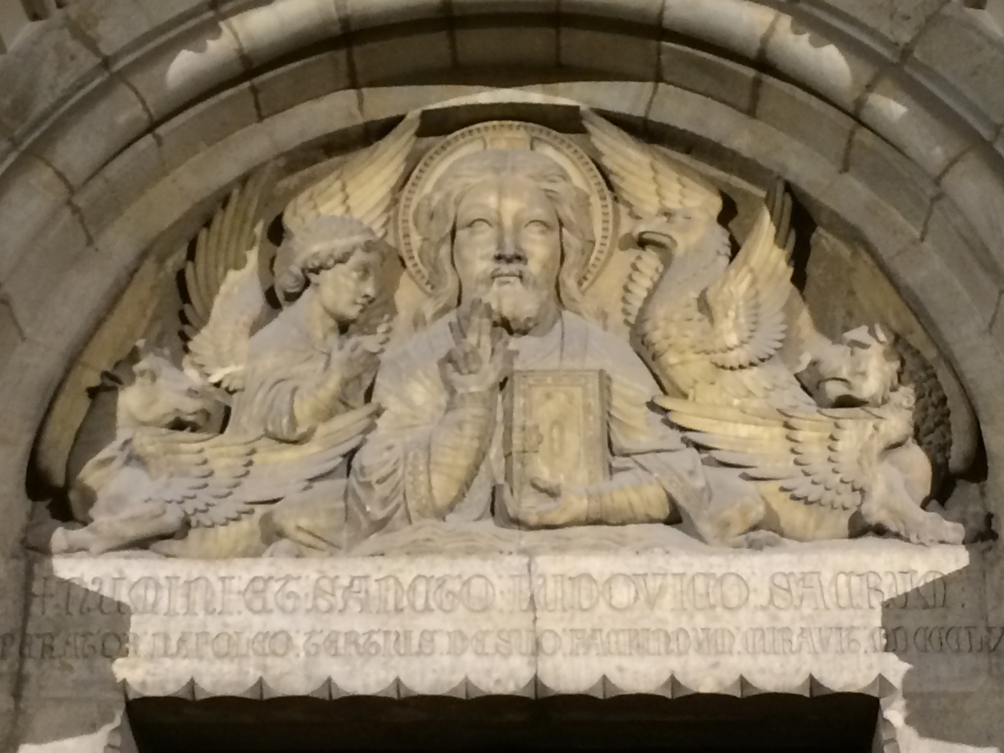 L'Église Saint-Louis de Vichy dans la nuit en Janvier 2014